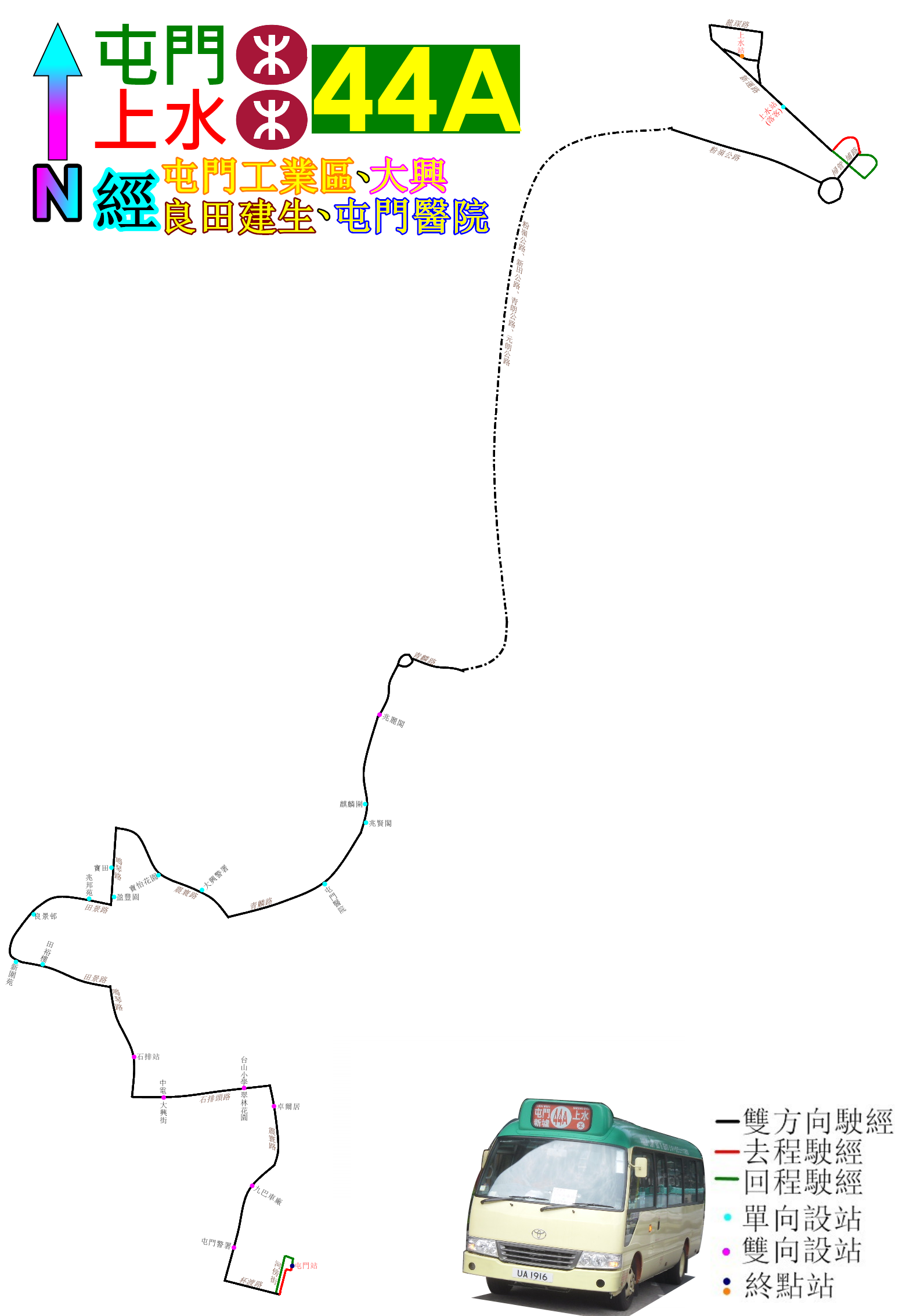 中文（香港）: 新界專線小巴44A線的走線圖